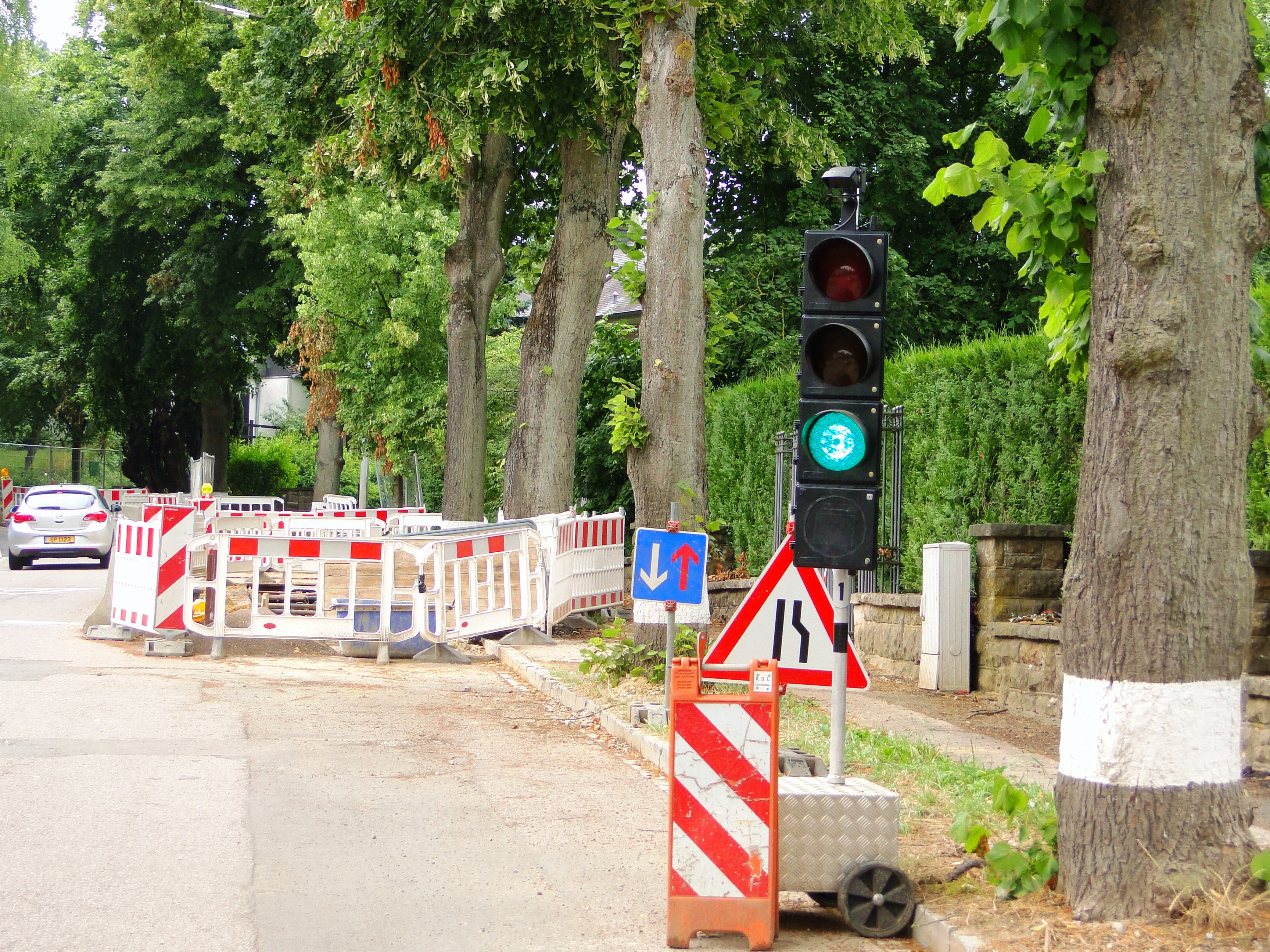 Verkéiersluucht Lëtzebuerg - Schantjen